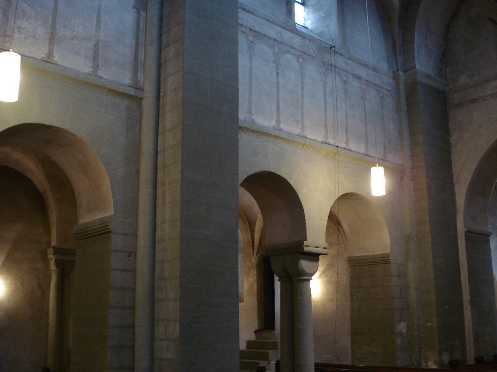 St. Andreas Ostönnen, Innenraum